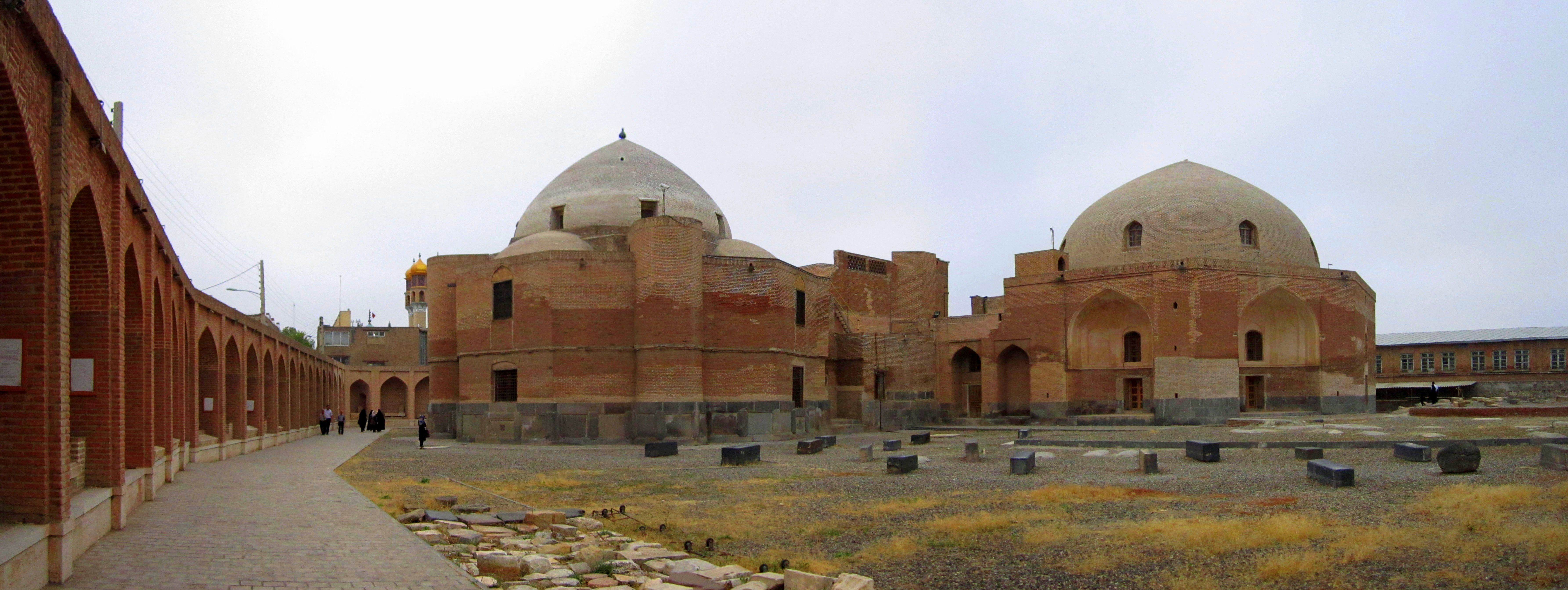 مقبره شیخ صفی و جانباختگان جنگ چالدران در اردبیل